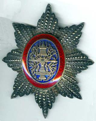 Description Ordre royal Cambodge Date23 mai 2006 à 17:02SourceOwn workAuthorJb1902 auteur de l'article Ordre royal Cambodge